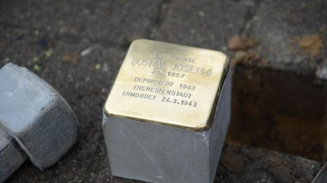 Stolperstein für Gustav Josephi bei der Verlegung